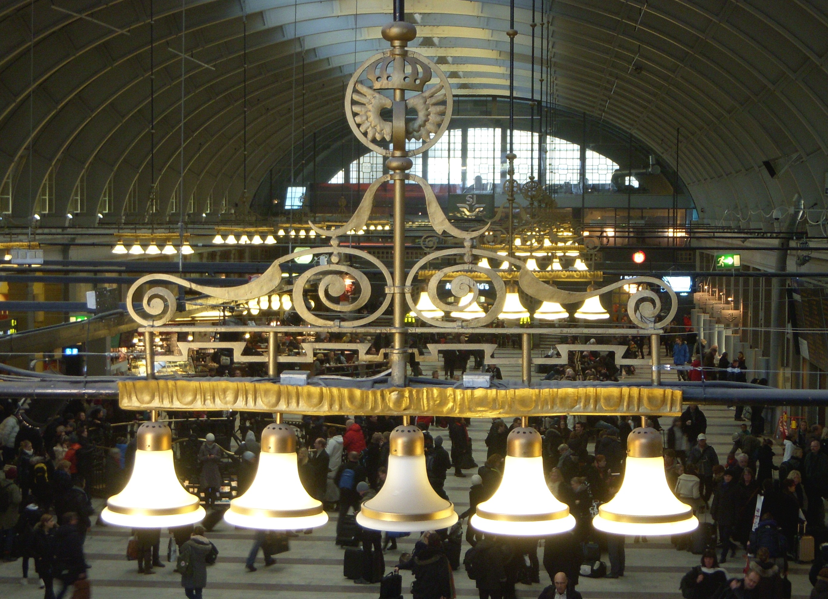 Belysningsarmaturer i vänthallen för Stockholms Centralstation